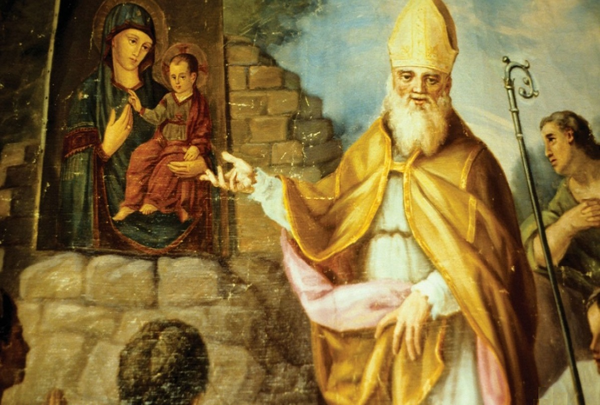 Der hl. Maximus zeigt dem Volk von Turin die Ikone der "Consolata". Historienbild, 19. Jahrhundert